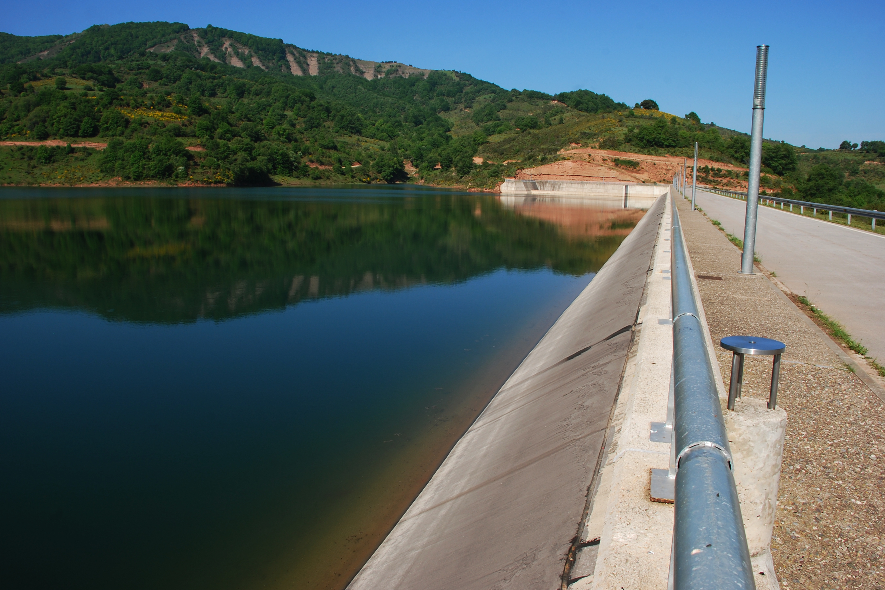 Presa de Yalde en Castroviejo, La Rioja - España.